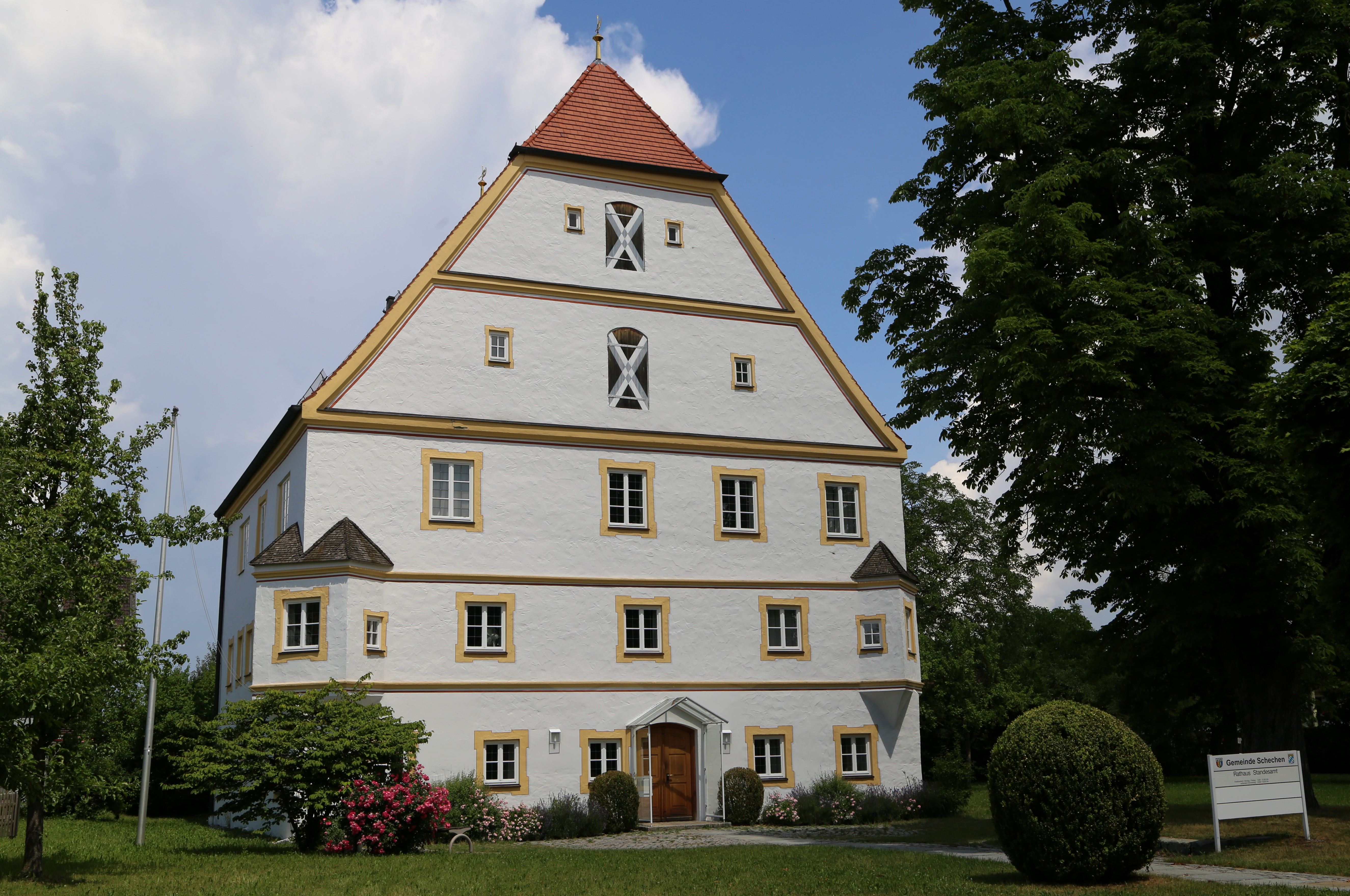 Rosenheimer Straße 13, Schechen; ehemaliges Schloss, seit 1978 Rathaus, zuvor Gasthaus, dreigeschossiger Bau mit steilem Krüppelwalmdach und zwei über Eck gestellten Erkern am Obergeschoss, 2. Hälfte 16. Jahrhundert